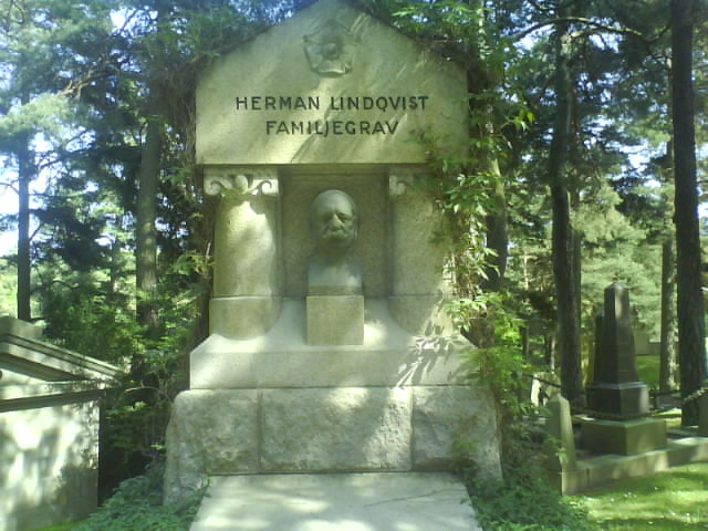 Herman Lindqvist grav. Graven avtäcktes redan 1920, med en urna på platsen där bysten senare sattes. Arkitekt var Erland Heurlin.